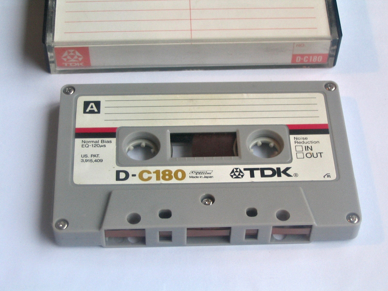 TDK D C180 cassette